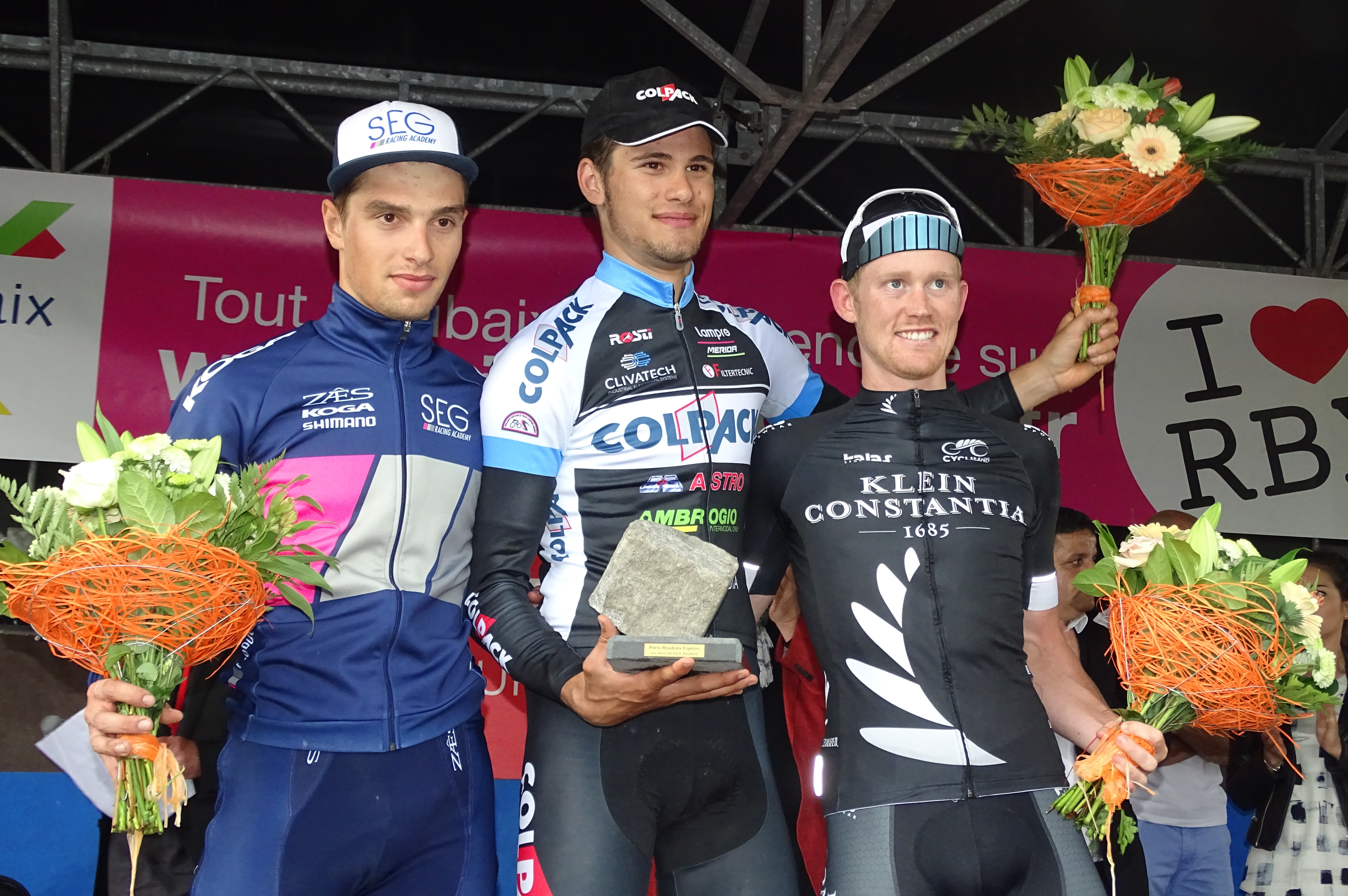 Reportage réalisé le dimanche 29 mai à l'occasion de l'arrivée du Paris-Roubaix espoirs 2016 au vélodrome André-Pétrieux à Roubaix, Nord, Nord-Pas-de-Calais-Picardie, France.